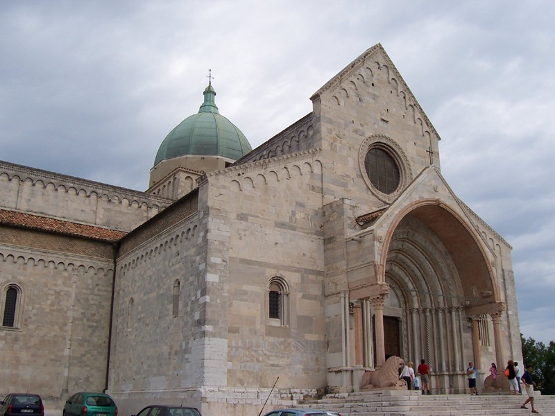 Ancona - Basilica di S. Ciriaco